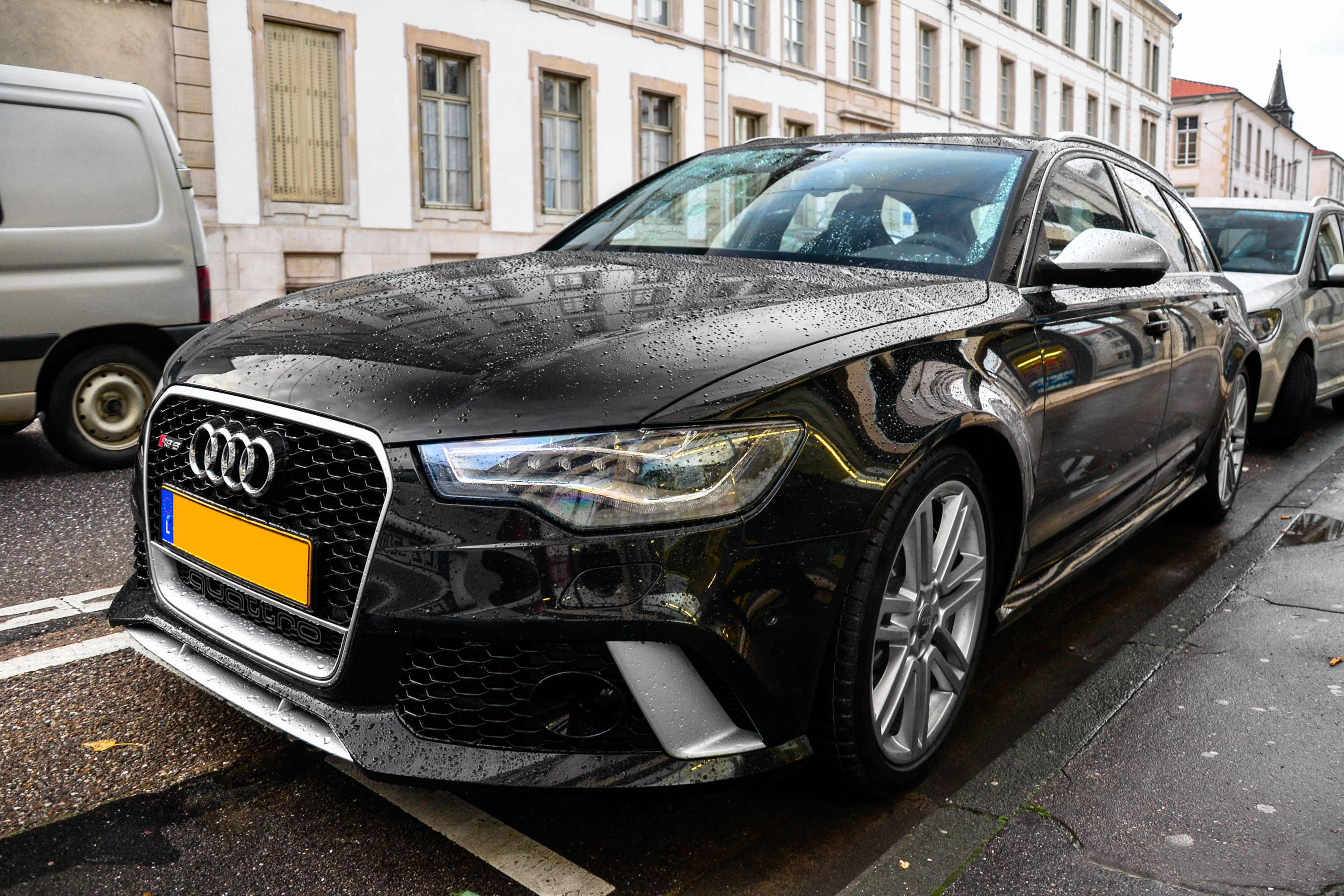 Audi RS6 C7